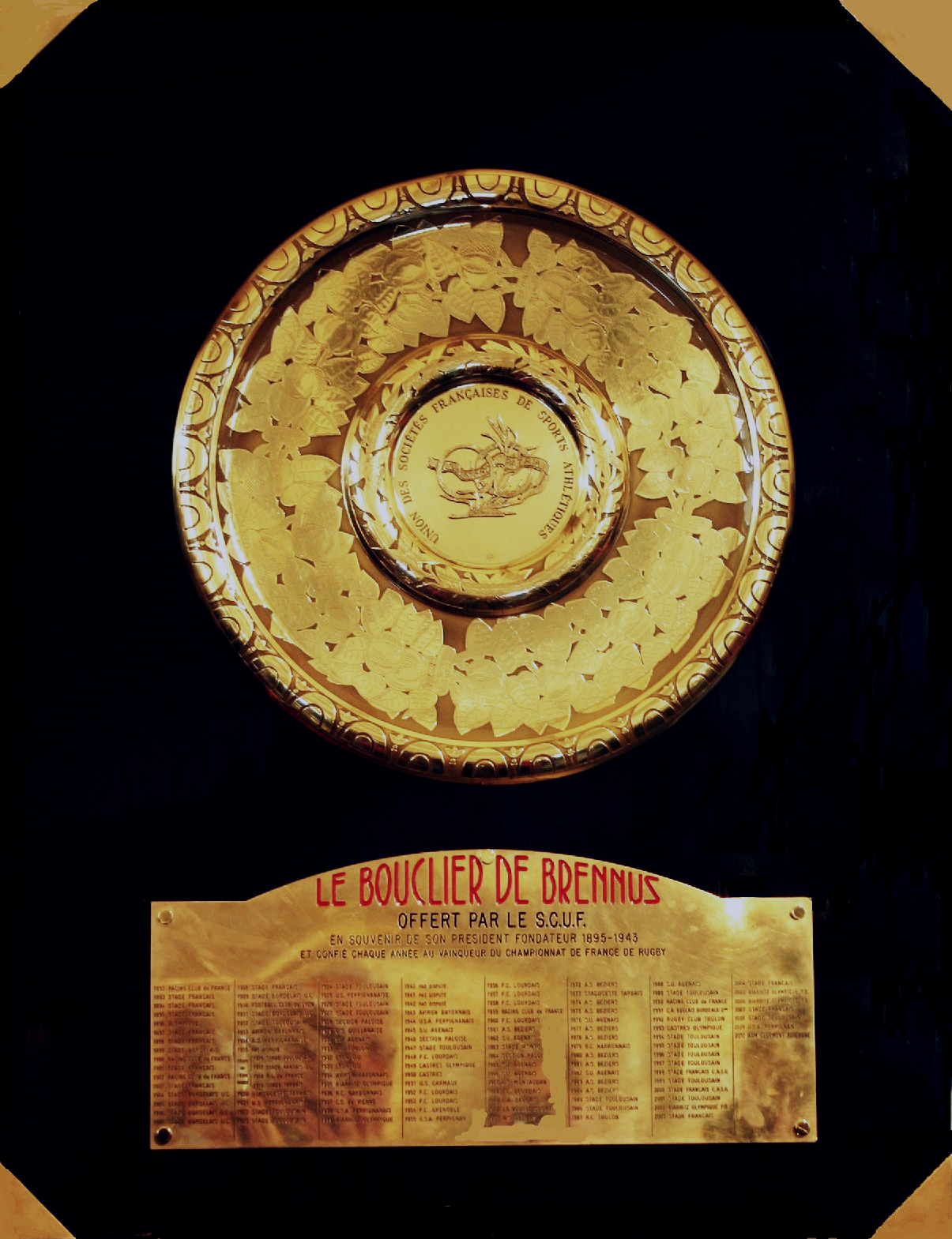 Bouclier ciselé en 1892 par Charles Brennus (1859-1943) comme trophée pour le vainqueur de la première finale du championnat de France de rugby à la demande de Pierre de Coubertin.